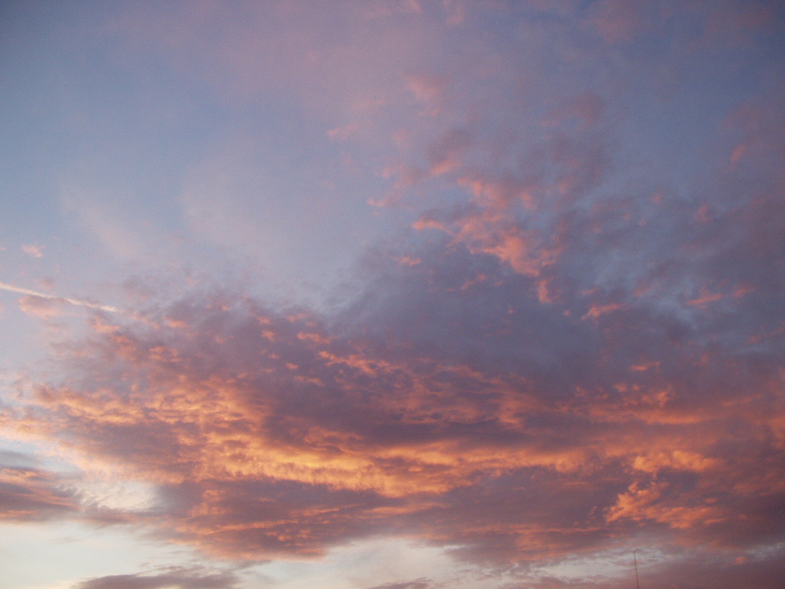 Oblak cirrostratus pri západe Slnka. Fotené v Banskej Bystrici, jún 2006. Autor Jana Plauchová